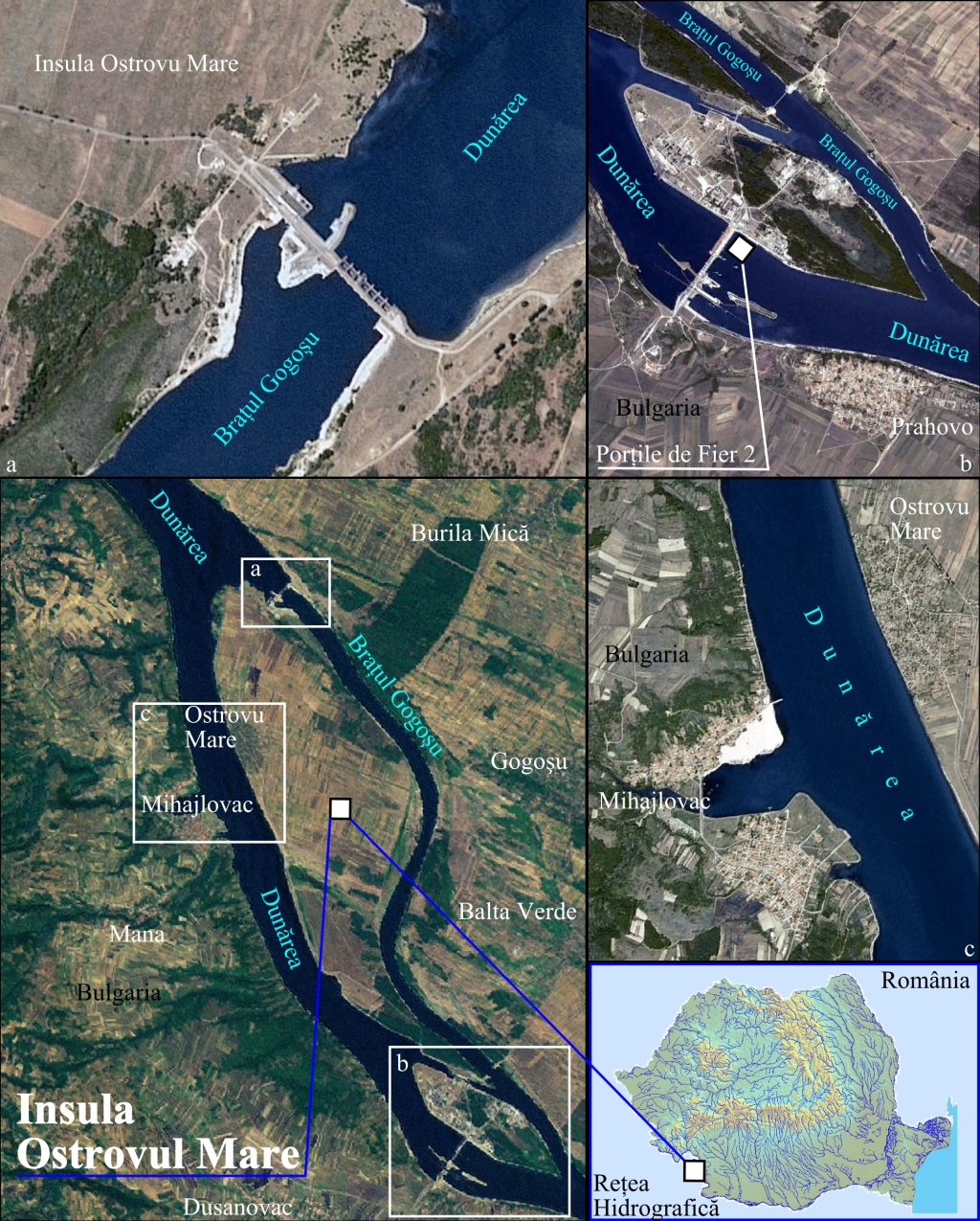 Braţul Gogoşu şi Insula Ostrovu Mare văzute din satelit. Imagine realizată cu date SRTM furnizate liber de NASA şi textură World Imagery.